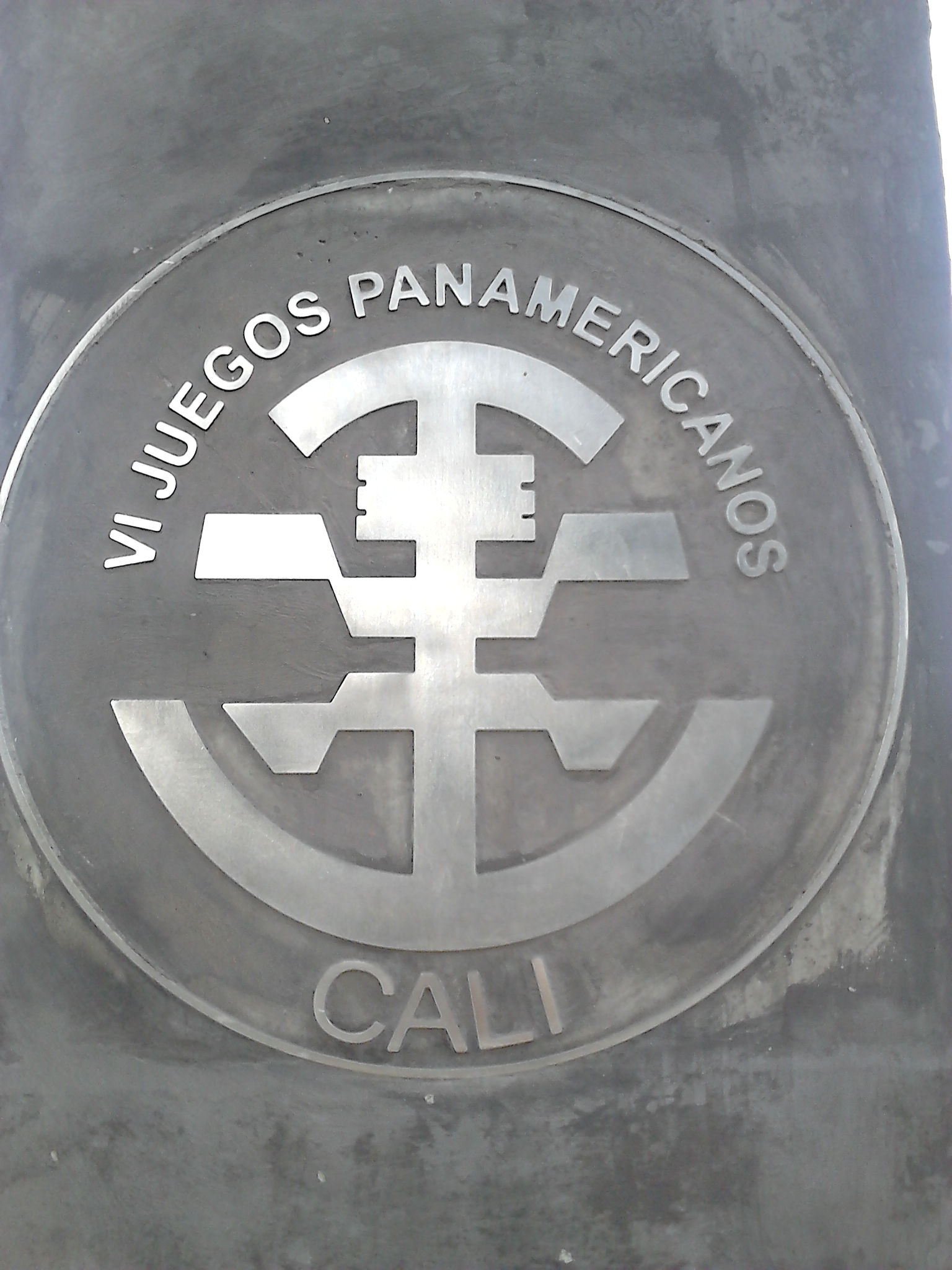 Busto de Jorge Herrera Barona en el exterior del Estadio Olímpico Pascual Guerrero Esta fotografía fue tomada en el municipio colombiano con código 76001.